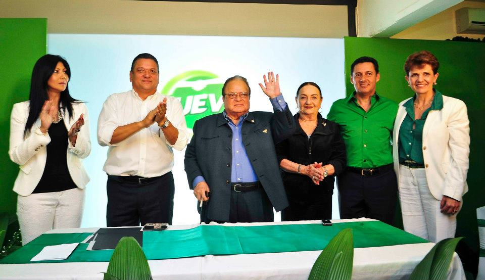 Johnny Araya anuncia precandidatura presidencial en el Balcón Verde acompañado de Antonio Álvarez Desanti, Nuria Marín Raventós, el ex Presidente Luis Alberto Monge, Doris Yankelewitz y Sandra León.